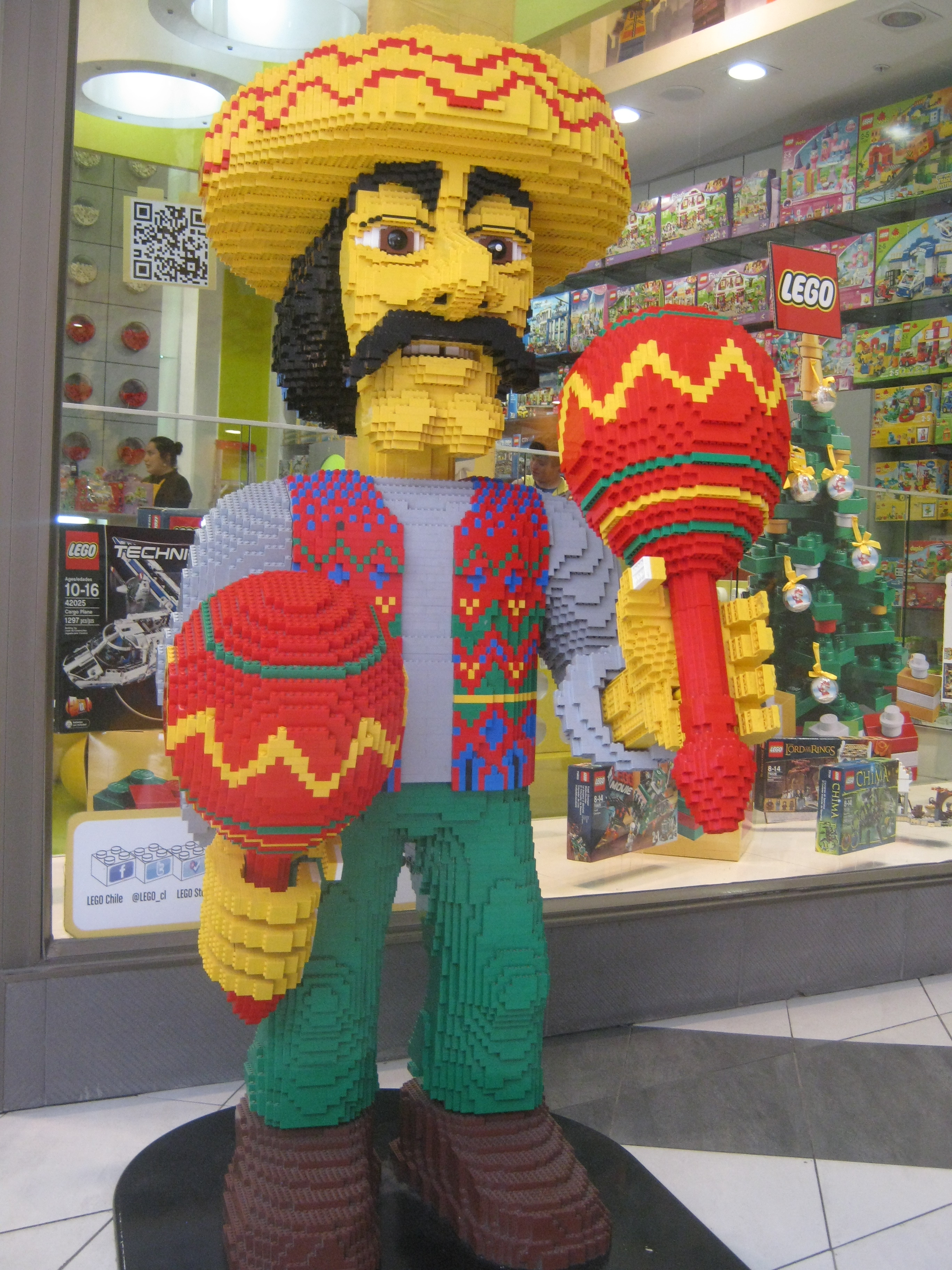 Escultura de lego representando a un mexicano